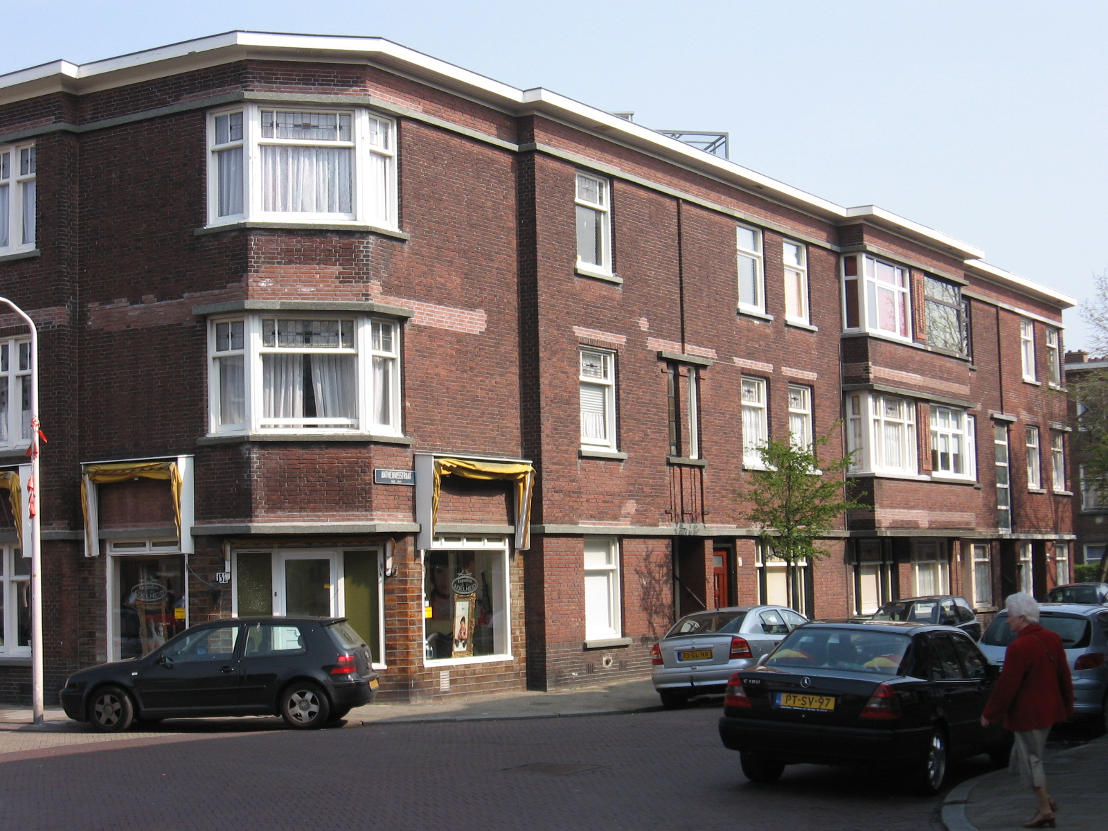 Atheunisstraat